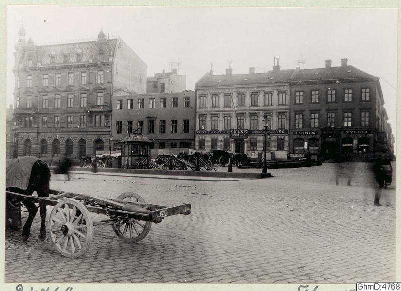 Lilla Torget 3-6, Göteborg, cirka 1903. Göteborgs stadsmuseums bildsamling, ur Theodor Åkermarks samling. Vid torget fanns en av stadens 13 värmestugor för droskkuskar, utplacerad i mitten av 1880-talet och finansierad av Blanche Dickson. Just den här togs bort 1948.